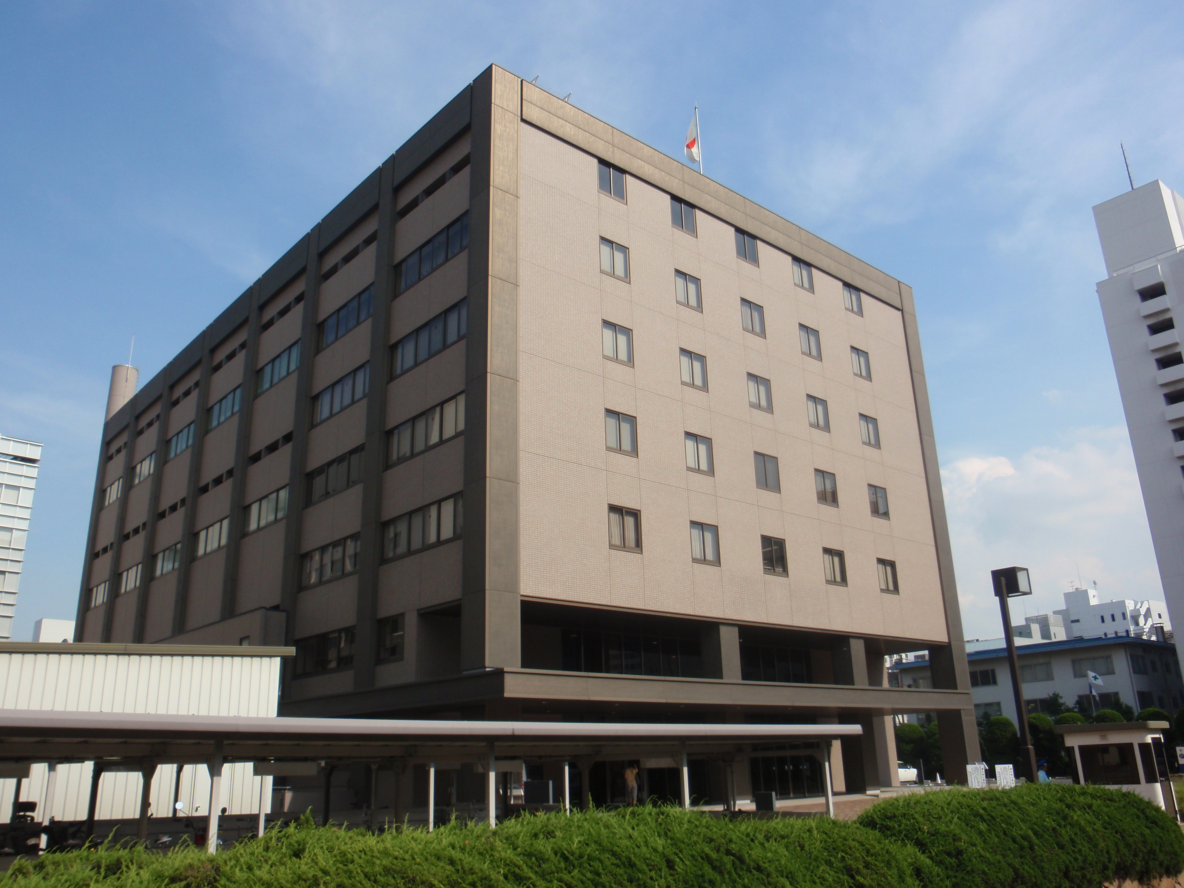 香川県高松市丸の内にある高松高等裁判所及び高松地方裁判所。